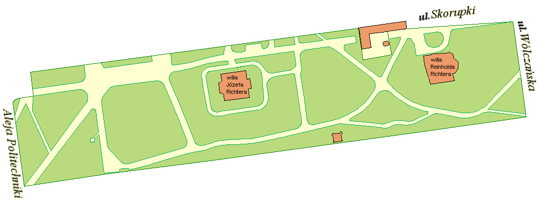 Mapa parku Klepacza Łódź